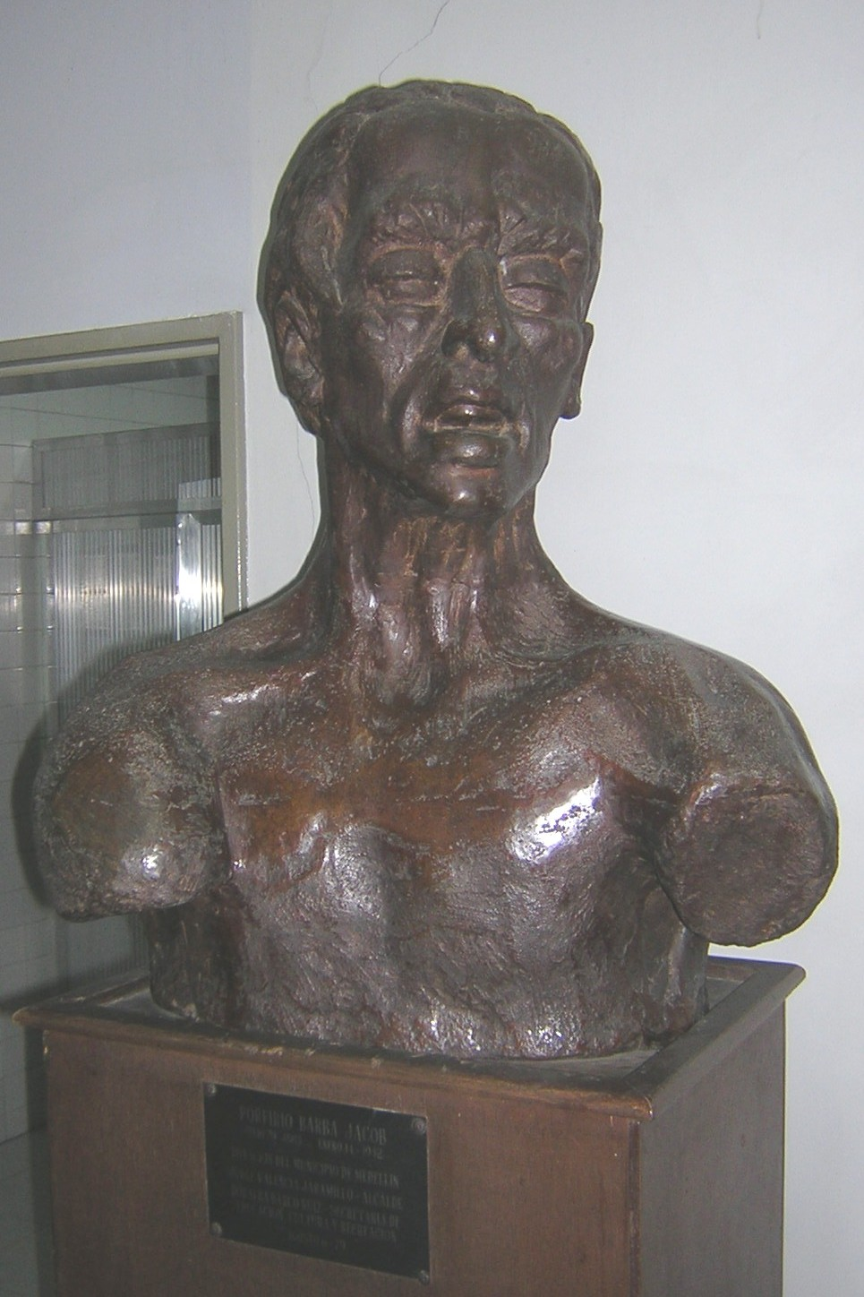 Busto Porfirio Barba Jacob, ubicada en la Biblioteca Publica Piloto de Medellín, Colombia